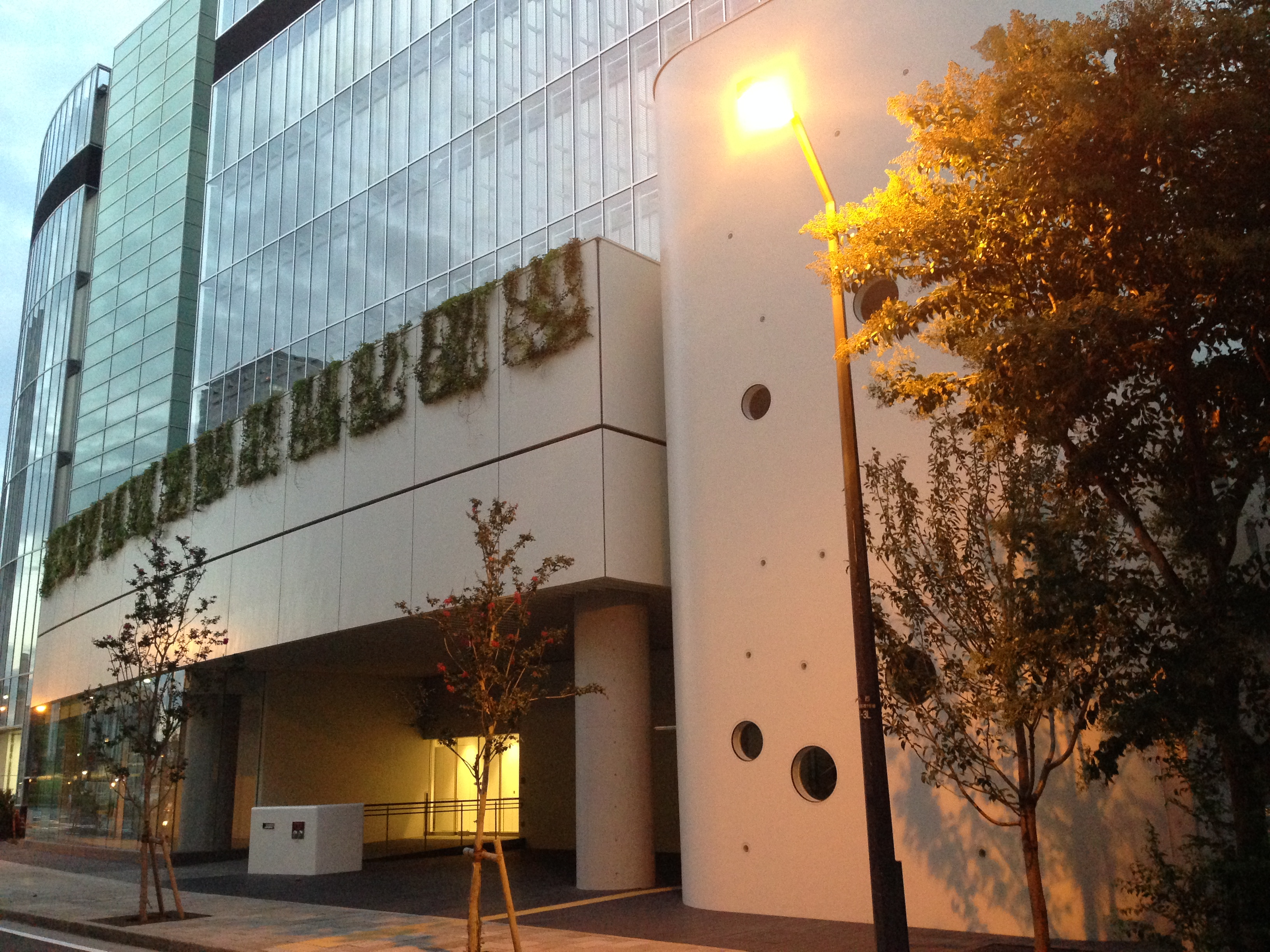 シンクロン本社ビル新館、エントランス側（西側）の外観。